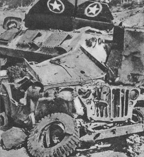 Una Jeep e un mezzo corazzato statunitense distrutti dai tedeschi